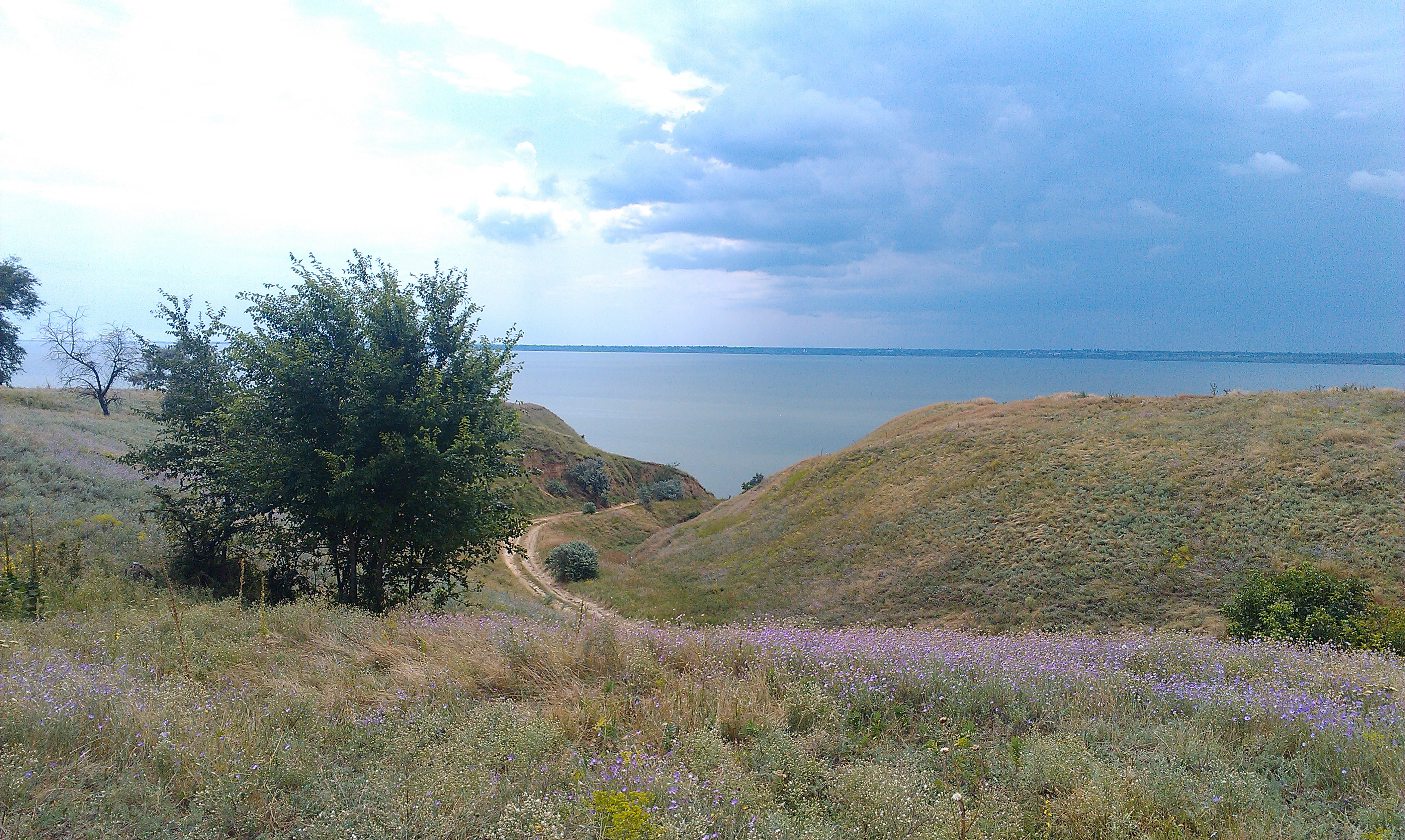 Спуск до Дністровського лиману. Трохи далі на правому пагорбі знаходилась центральна частина полісу, більша частина якого обвалилась у лиман через підмив ґрунту. Процес руйнування продовжується, адже берегова лінія неукріплена. Культурний шар просто обвалюється в воду. На жаль місцем зараз переймаються лише чорні копачі.